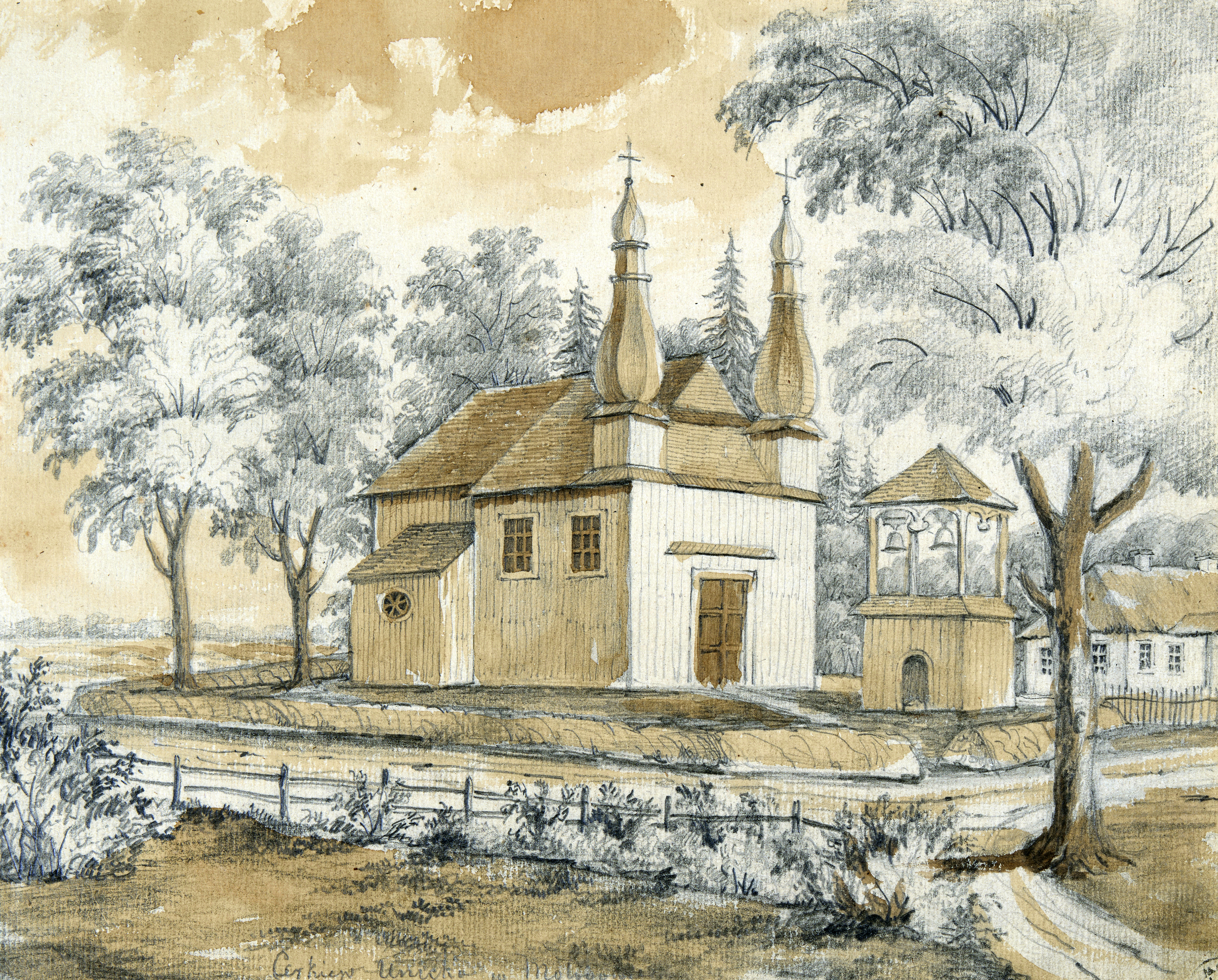 Беларуская (тарашкевіца): Моладаў (Moładaŭ). Царква Ўшэсьця Гасподняга